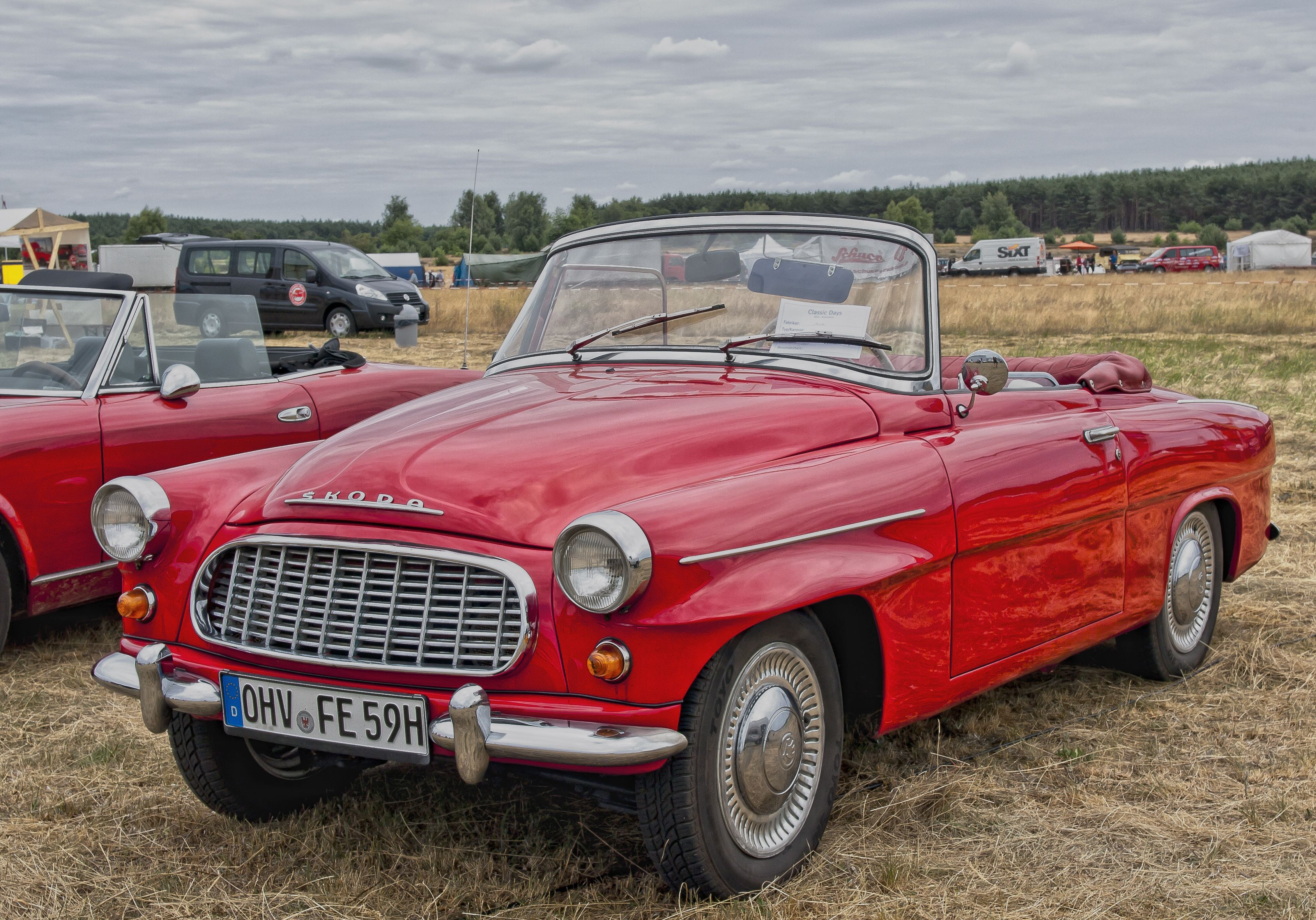 Skoda Felicia